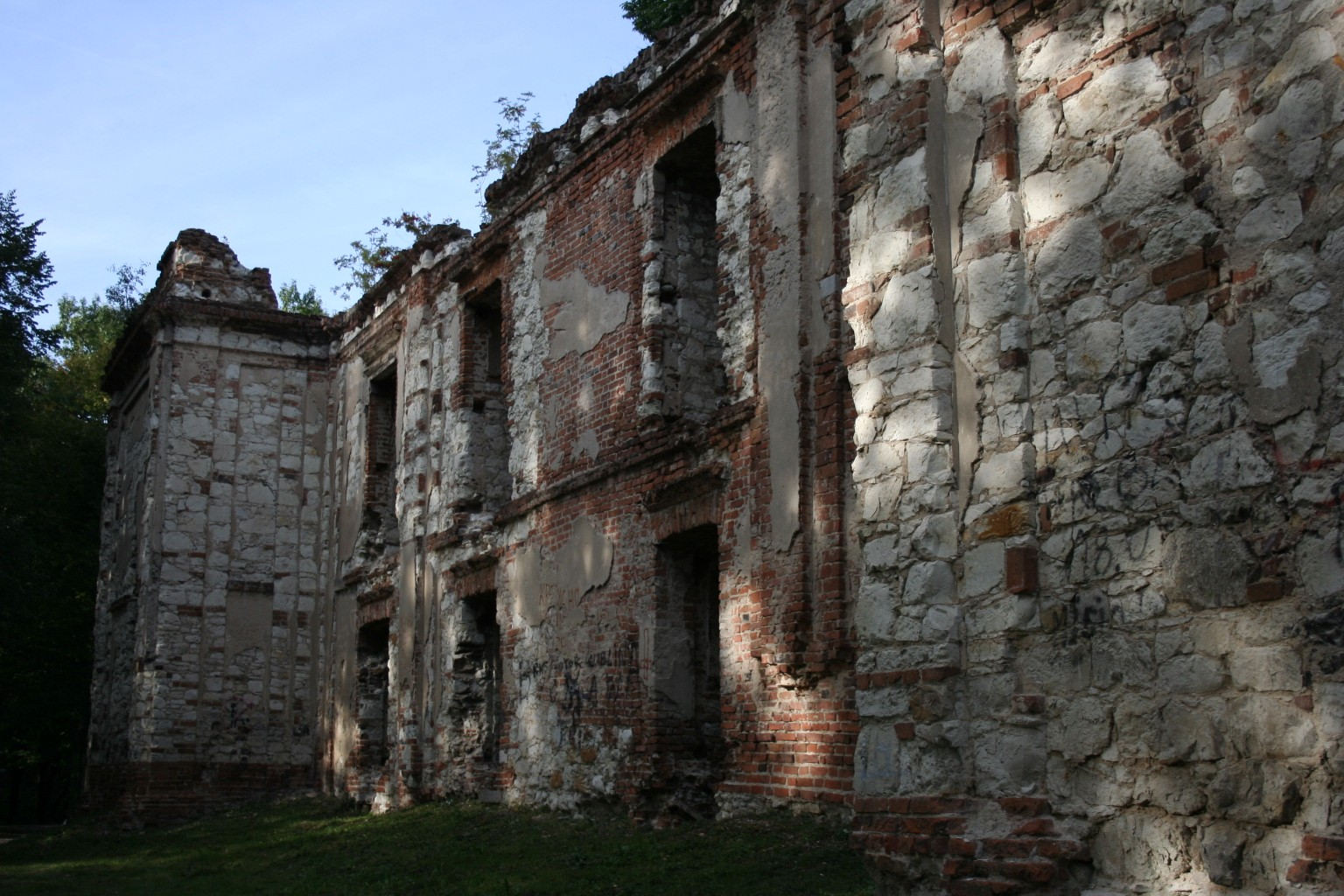 Bychawa Podzamcze - zespół pałacowy (XVIII-XIX): ruina pałacu (zabytek nr rejestr. A/291 z 31.03.1967)